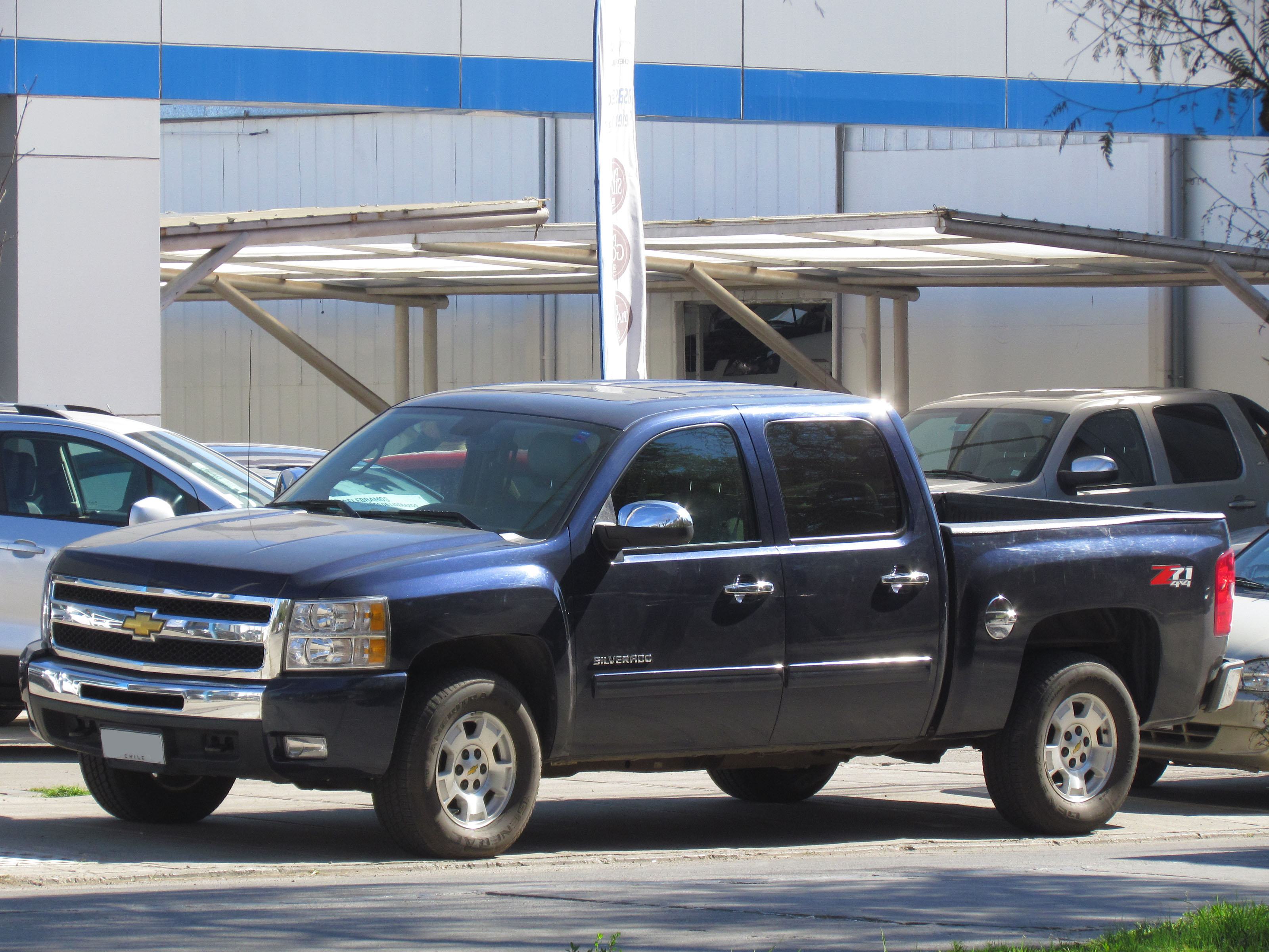 Chevrolet Silverado LT Z71 2011